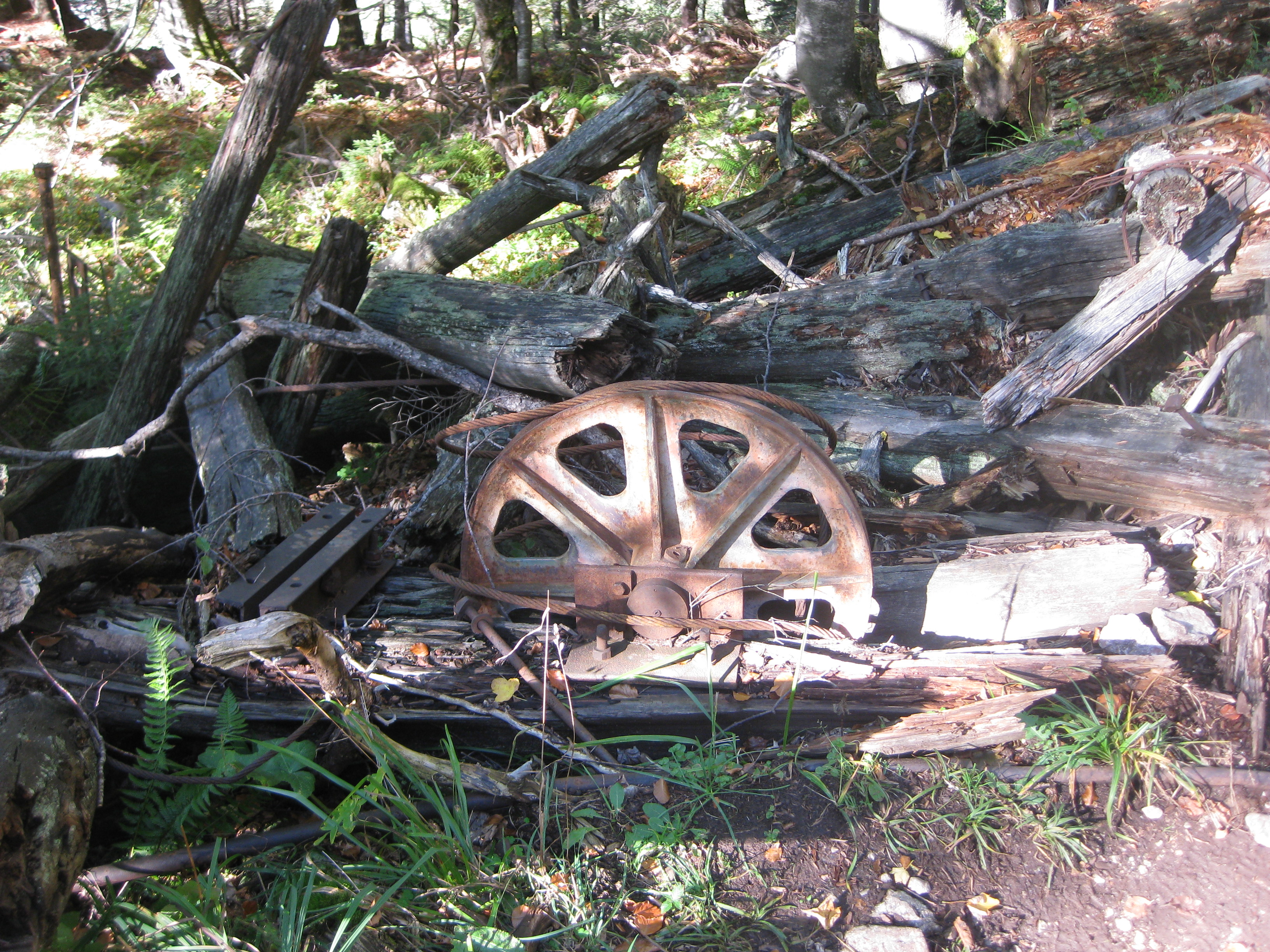 Ehemalige Bergstation der Materialseilbahn Fischunkelalm-Röth